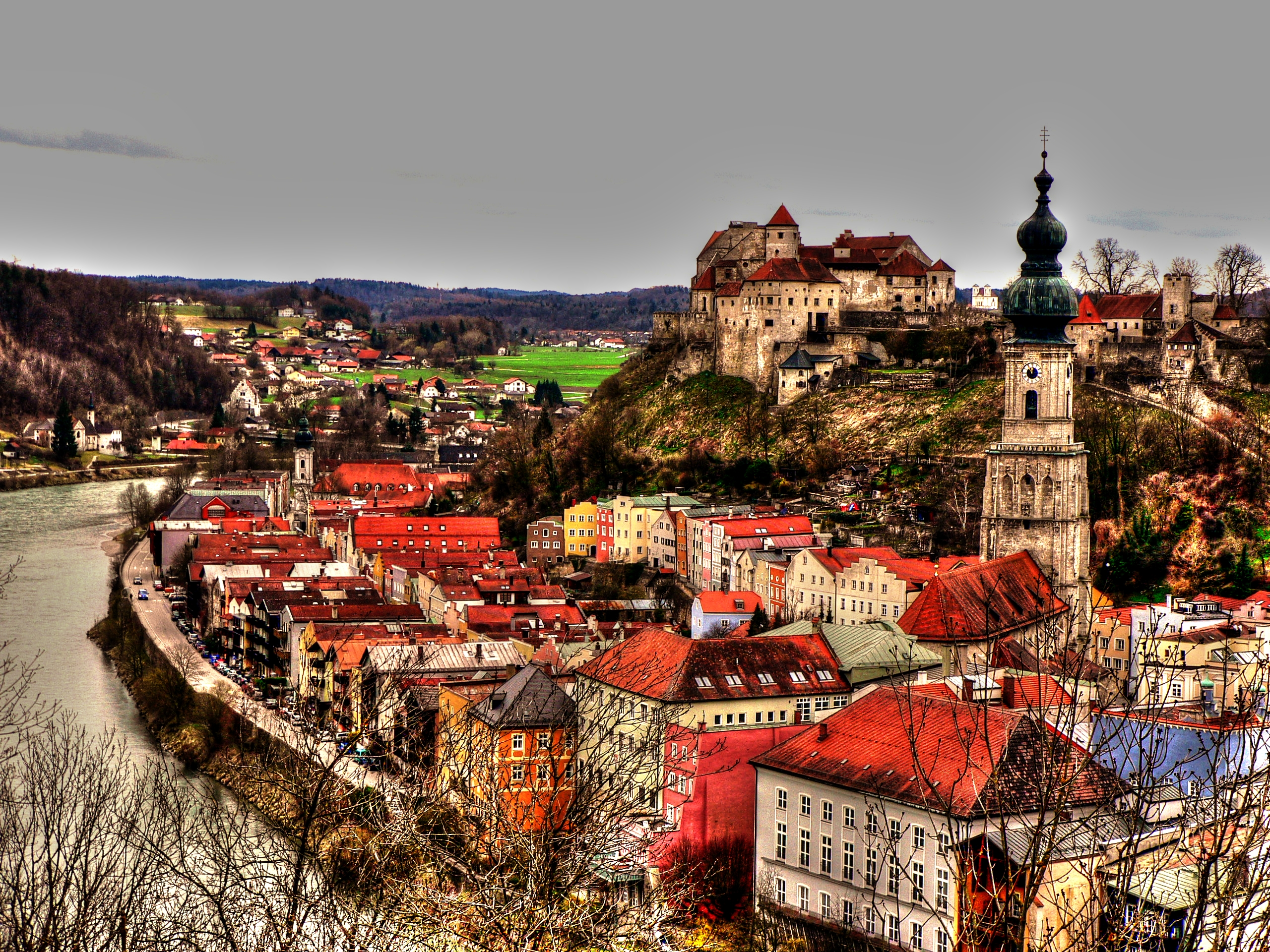 Burghausen. Blick vom österreichischem Salzachufer auf die Stadt und die längste Burganlage Europas